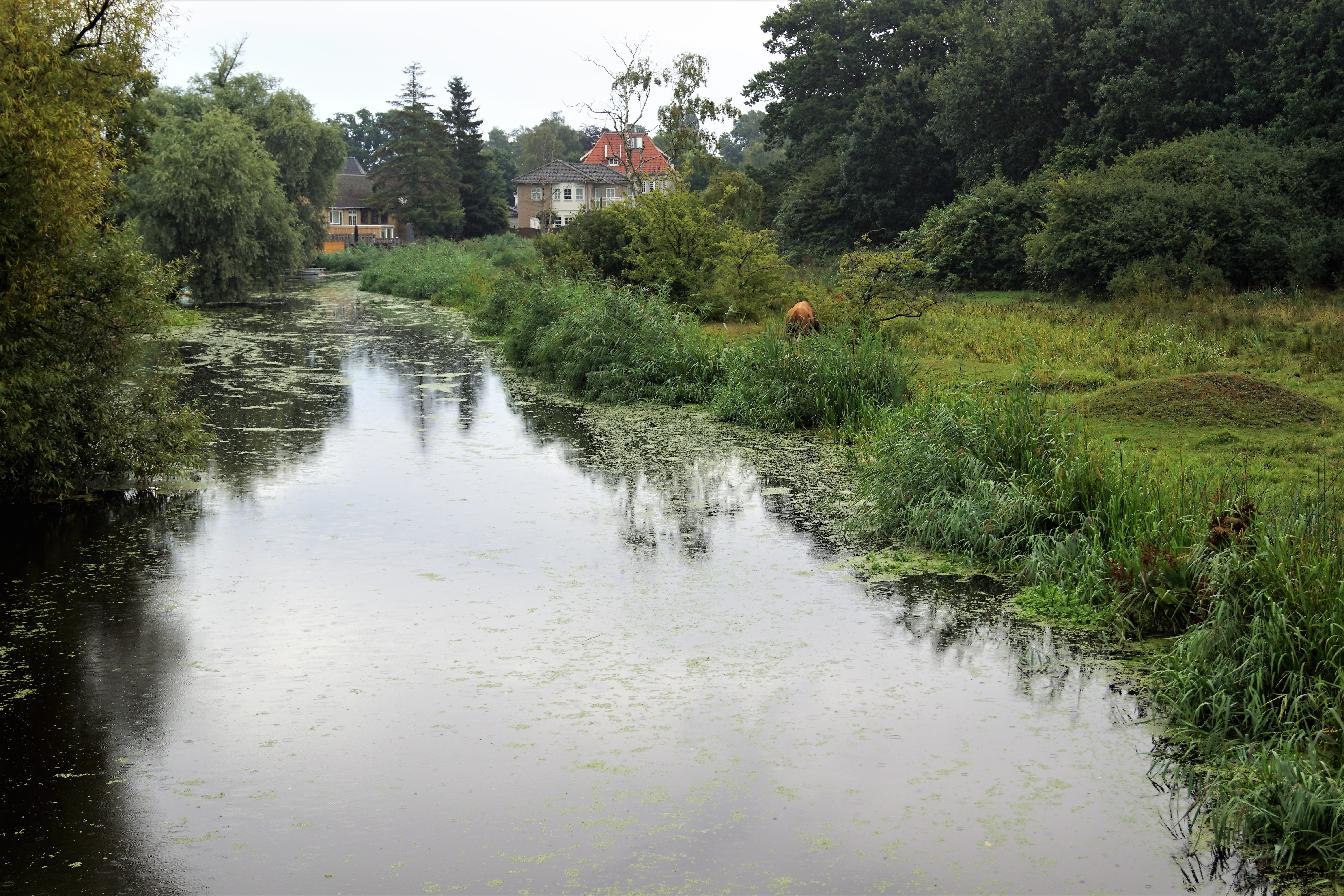 Tryggevælde Å set mod syd fra Prambro, nær udløbet